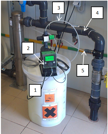 Vandens dezinfekavimas natrio hipochlorito tirpalu vandenvietėse 1 – natrio hipochlorito tirpalo (dezinfekanto) talpa; 2 – dozavimo siurblys; 3 – dezinfekanto padavimo linija; 4 – vandentiekio linija vartotojams; 5 – dezinfekanto įterpimo į vandentiekio liniją vieta